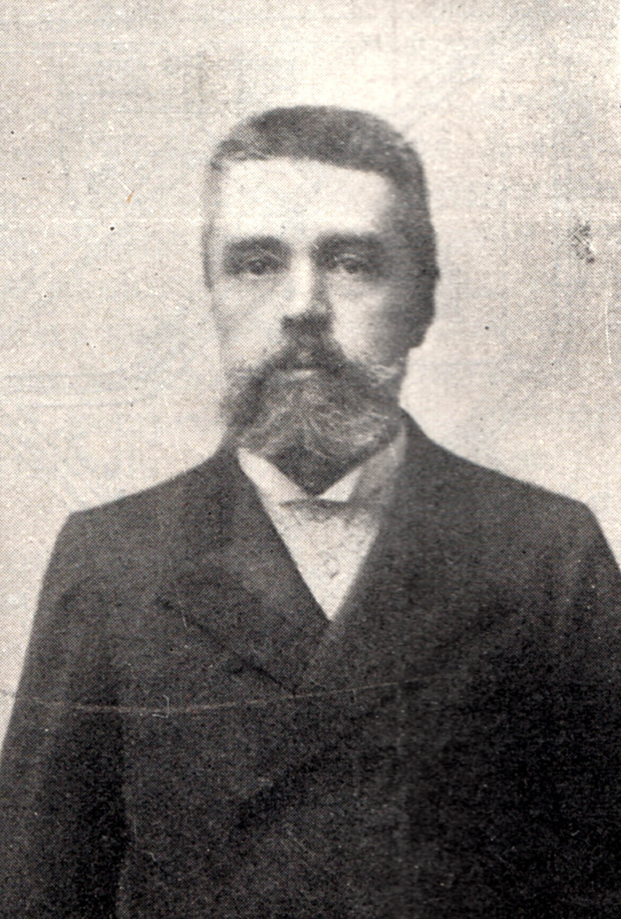 Архітектор Вінцент Равський-молодший (1857—1927).